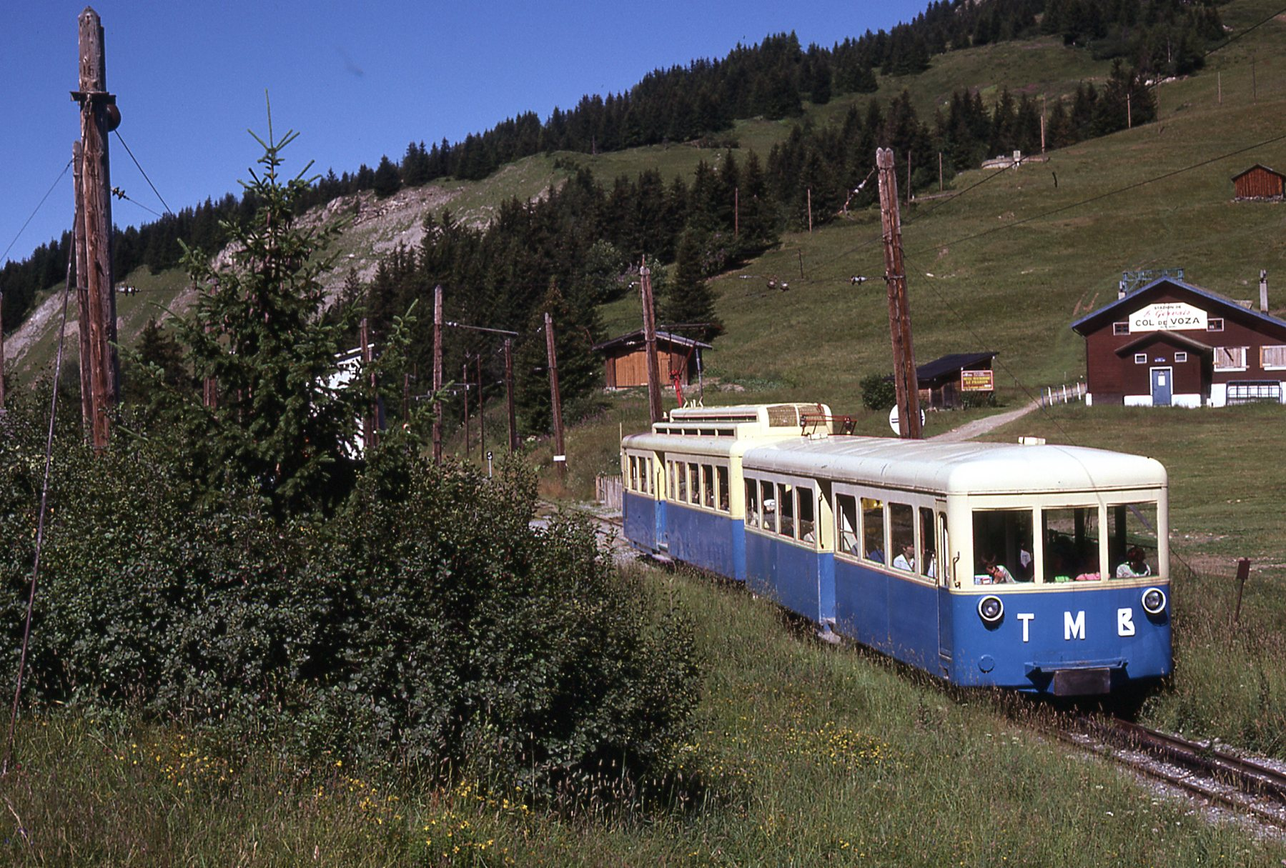 Photo: Trams aux Fils. Prise en septembre 1979